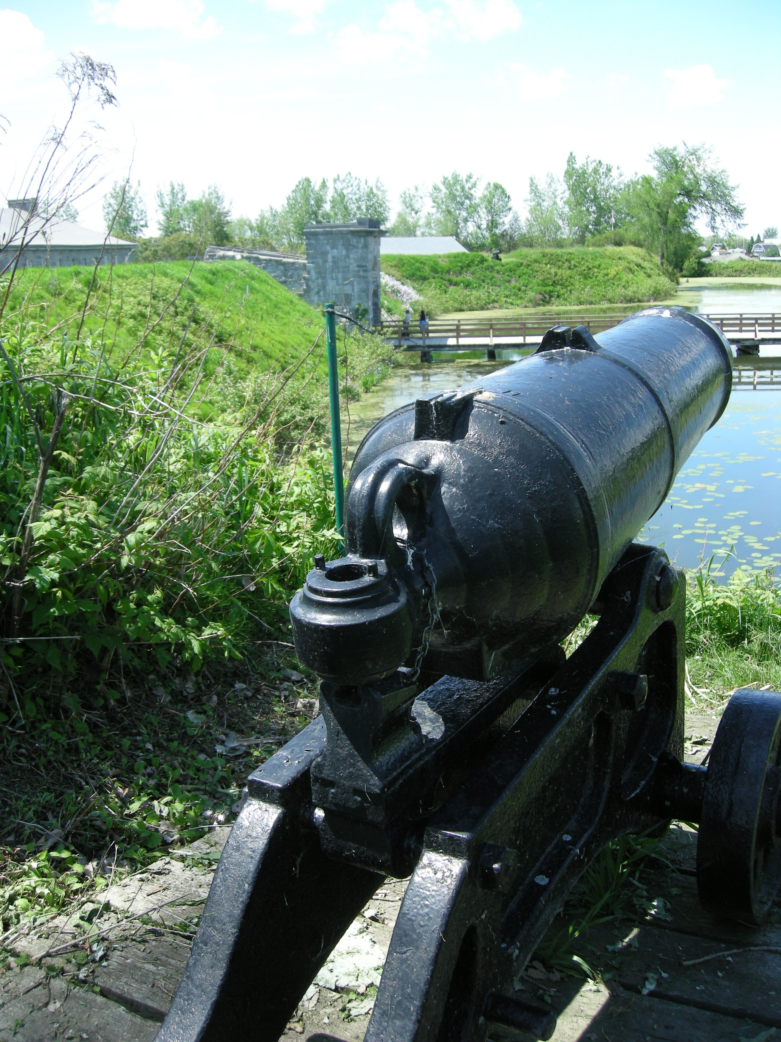 Français cadien: Vue des remparts